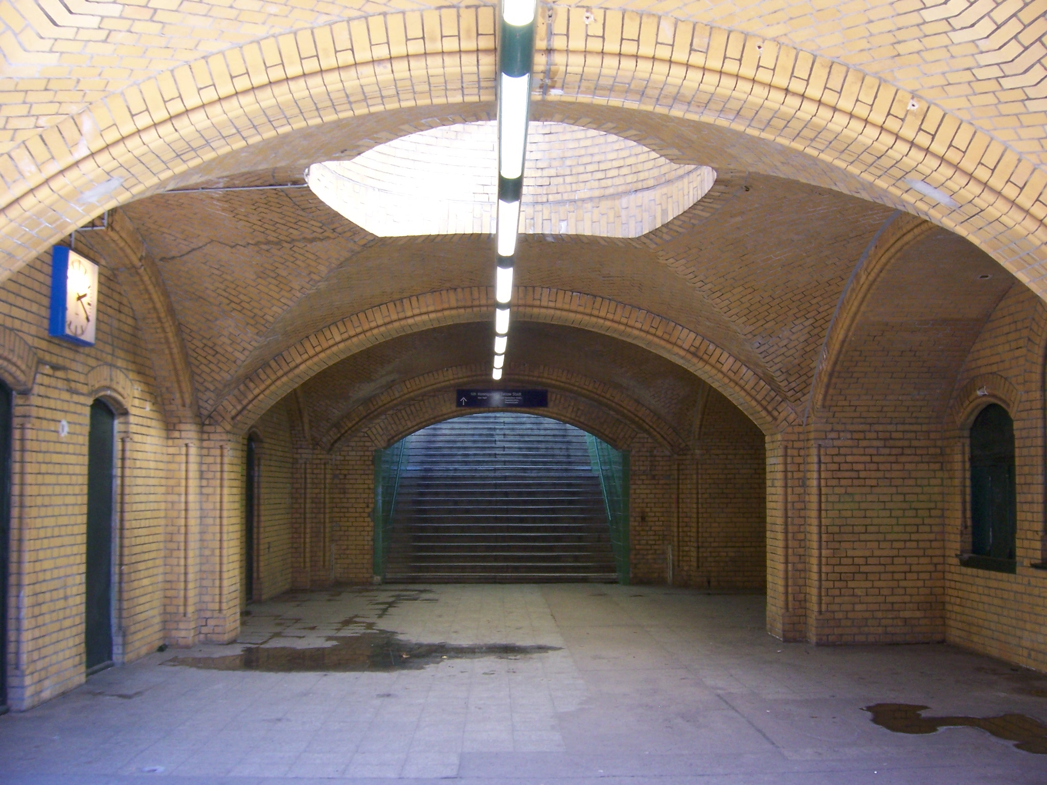 Bahnhof Berlin - Eichborndamm Zugang 3